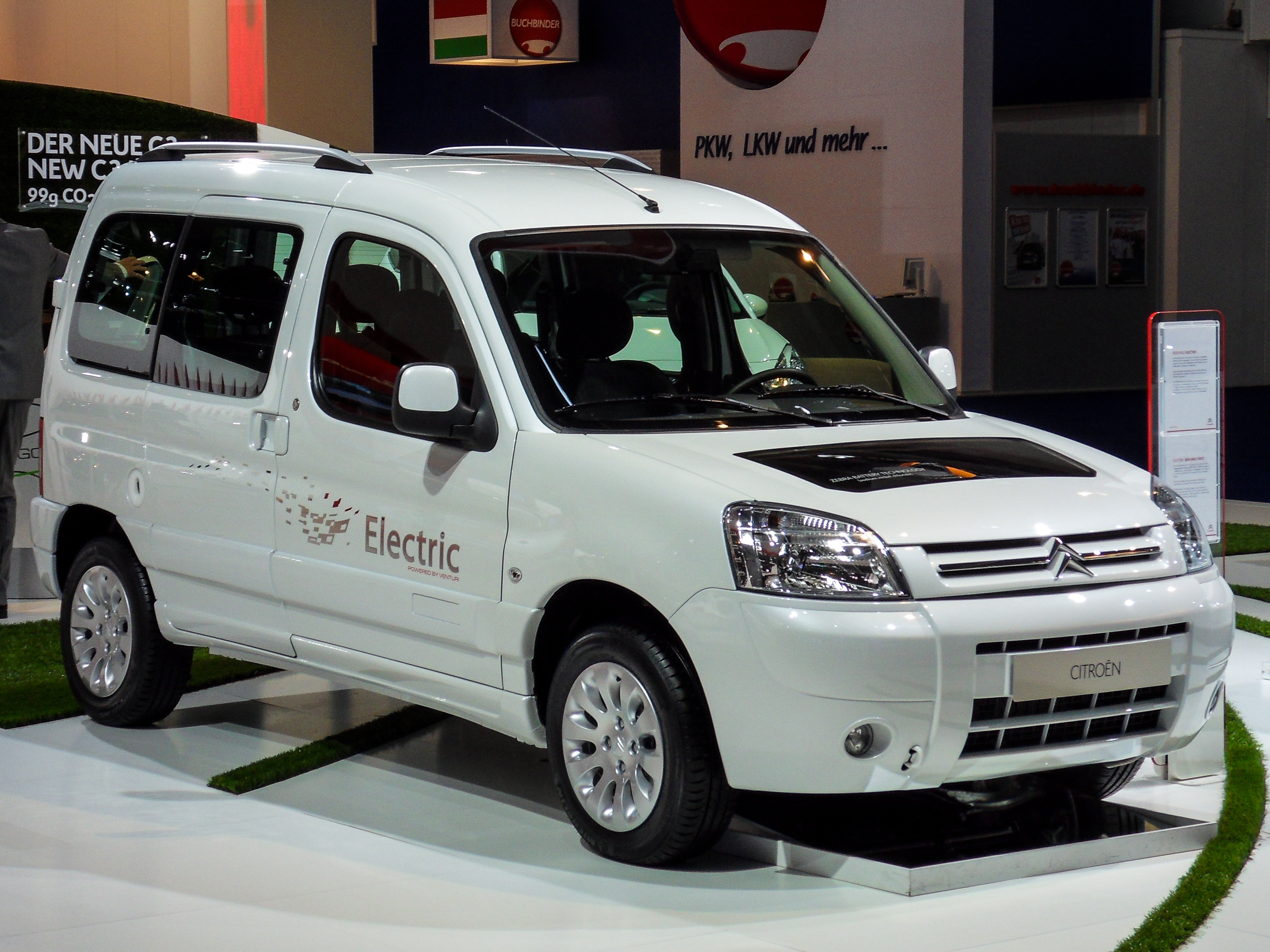 Ein Citroen Berlingo Electric, ausgestellt auf der Internationalen Automobilausstellung 2009 in Frankfurt am Main, Deutschland. In der Motorhaube befindet sich ein transparenter Einsatz, der einen Blick auf die Antriebseinheit ermöglicht und zudem als Berührschutz dient.